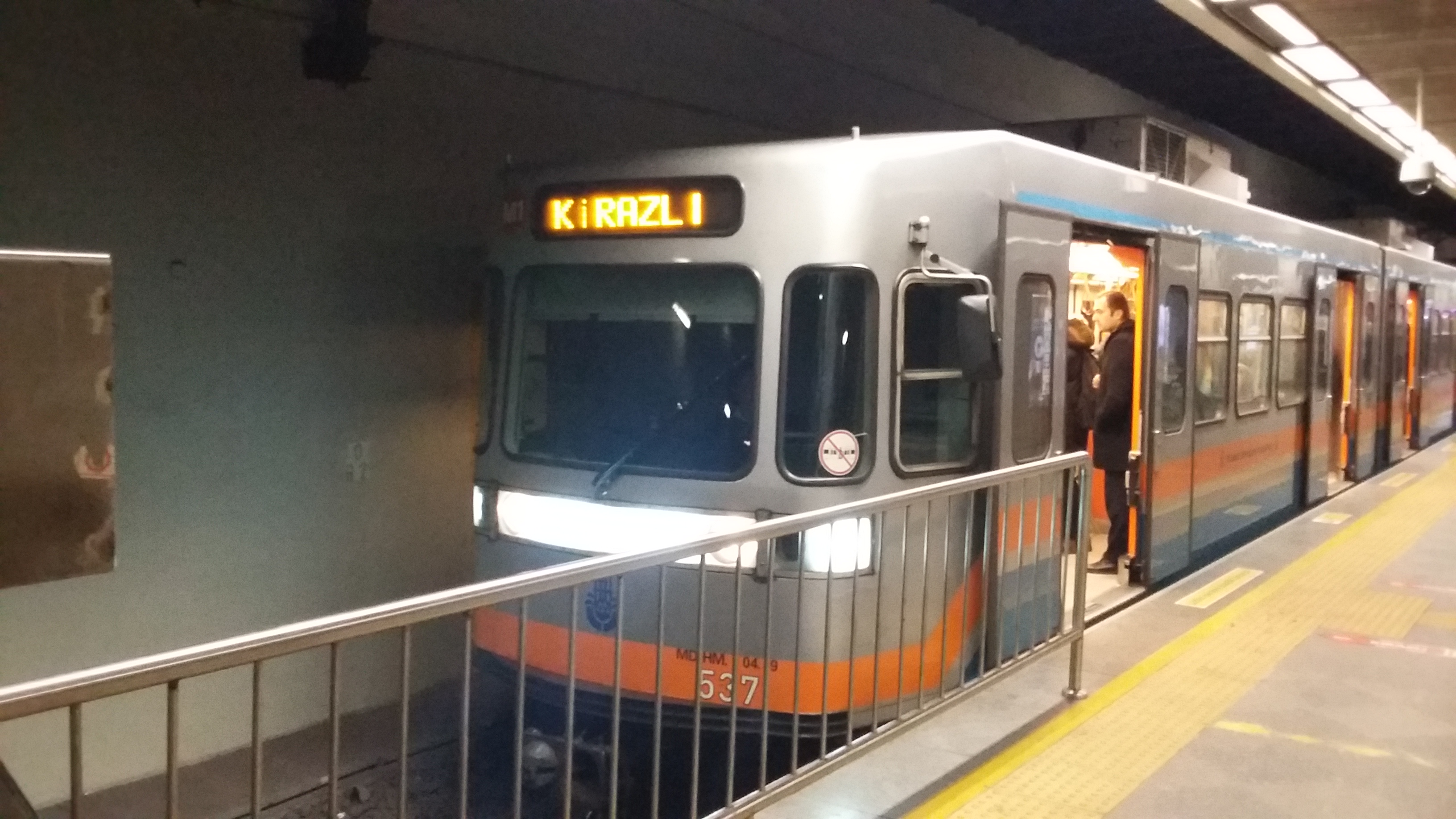 Aksaray Metro İstasyonu